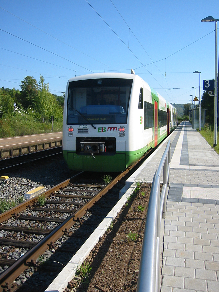 Der modernisierte Bahnhof Schweinfurt Stadt mit UnterfrankenShuttle der Erfurter Bahn.